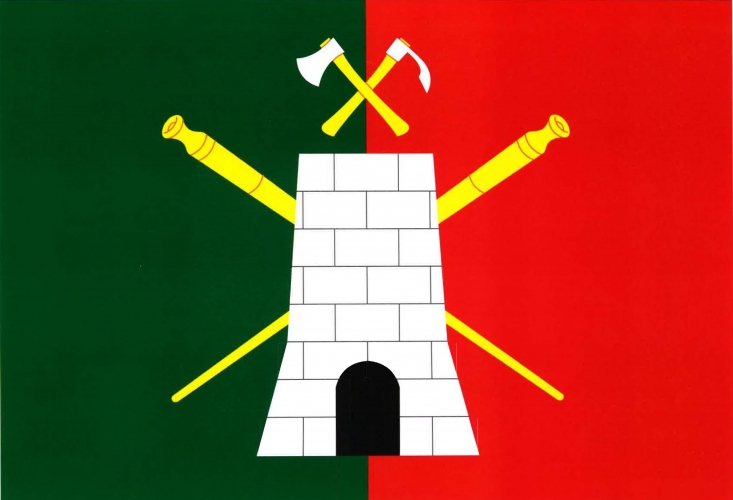 vlajka, Pec, okres Domažlice